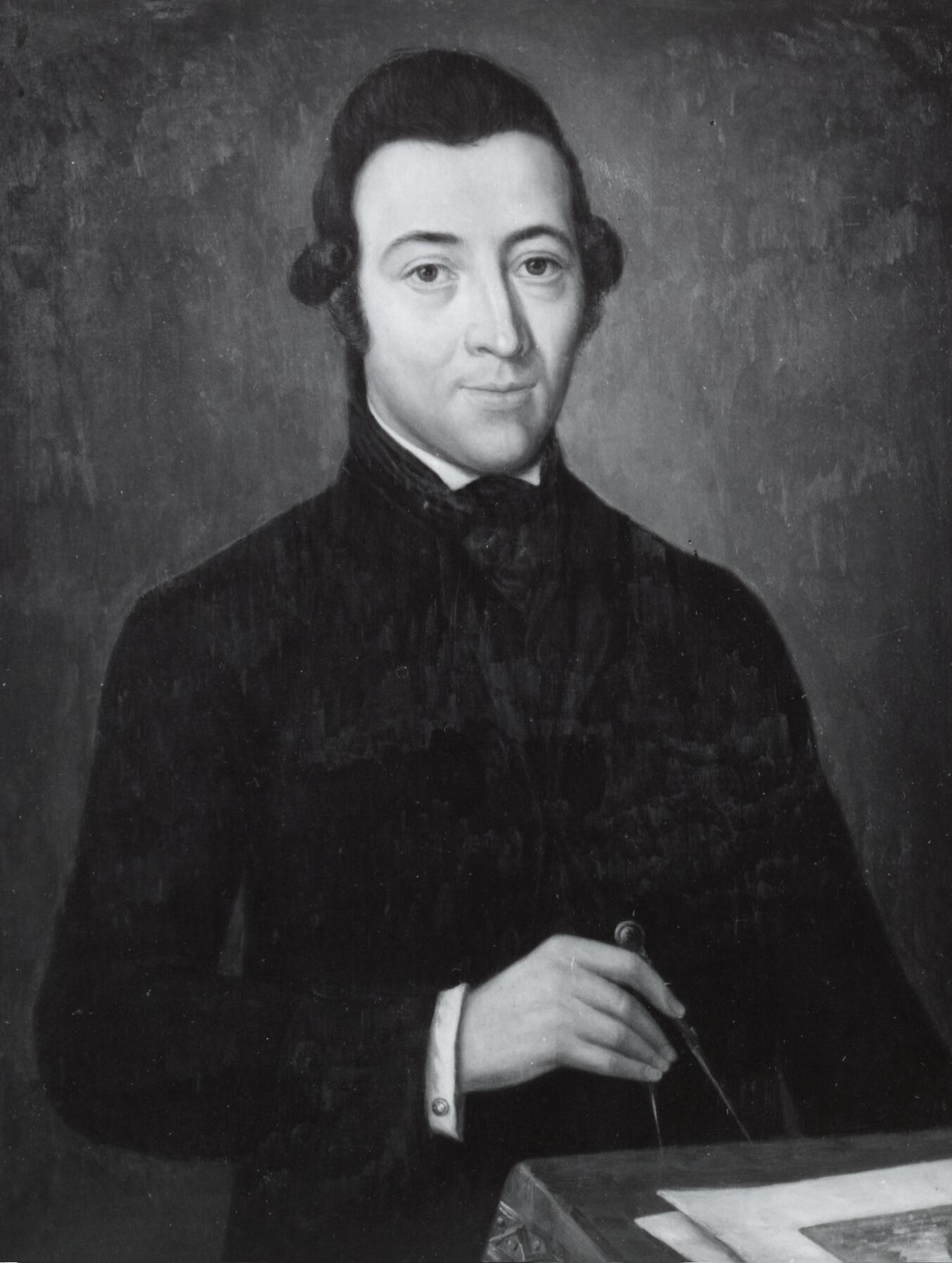 Lucas Oldenhuis Kymmell (1754-1825)